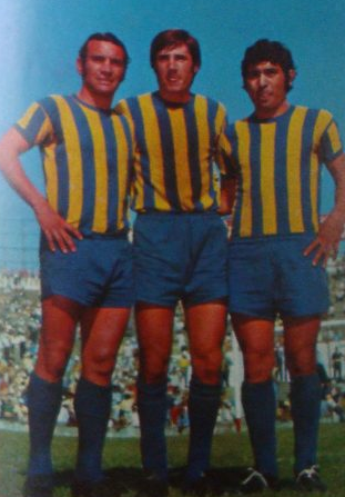 José Mesiano, Ángel Landucci y Miguel Bustos